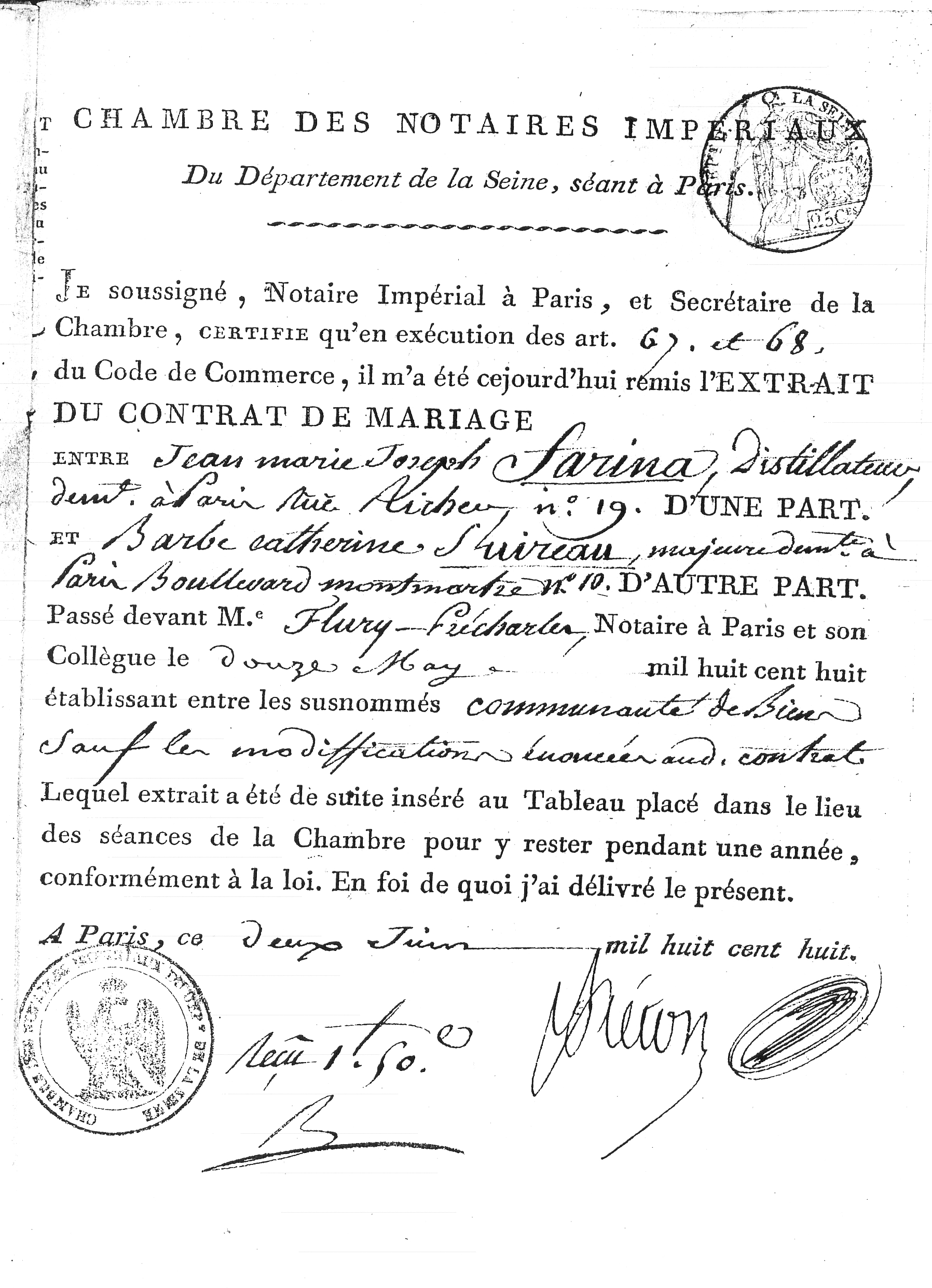 contract de mariage 1808 de Jean Marie Joseph Farina avec Durochereau, Paris.